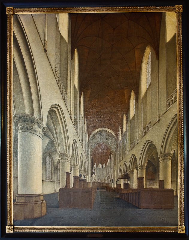 View from entrance of the church choir in St. Bavo church in Haarlem - Zicht vanaf ingang op koor van de kerk Sint Bavo in Haarlem